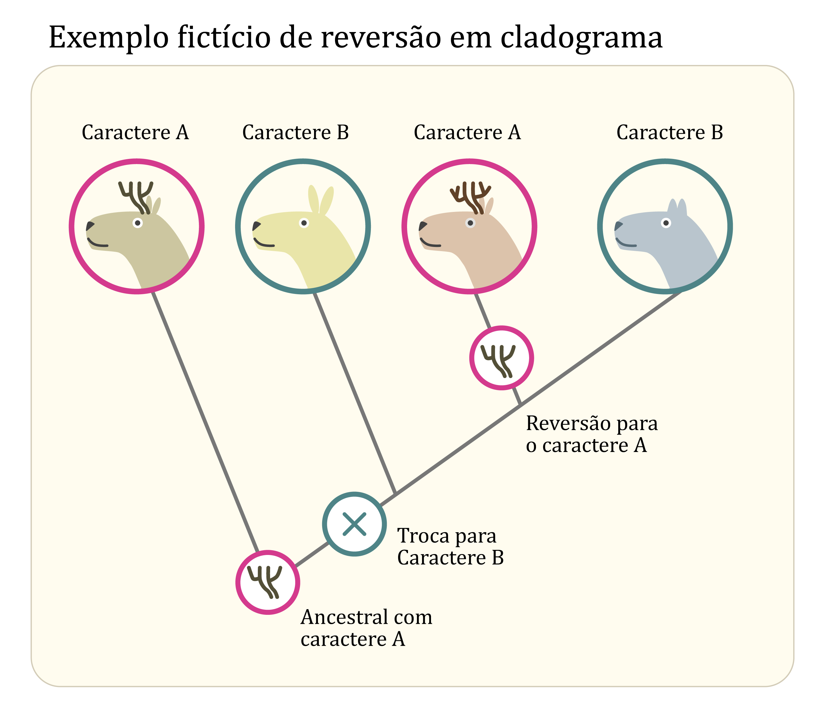 Português do Brasil: Cladograma mostrando esquemáticamente a reversão de um caractere.